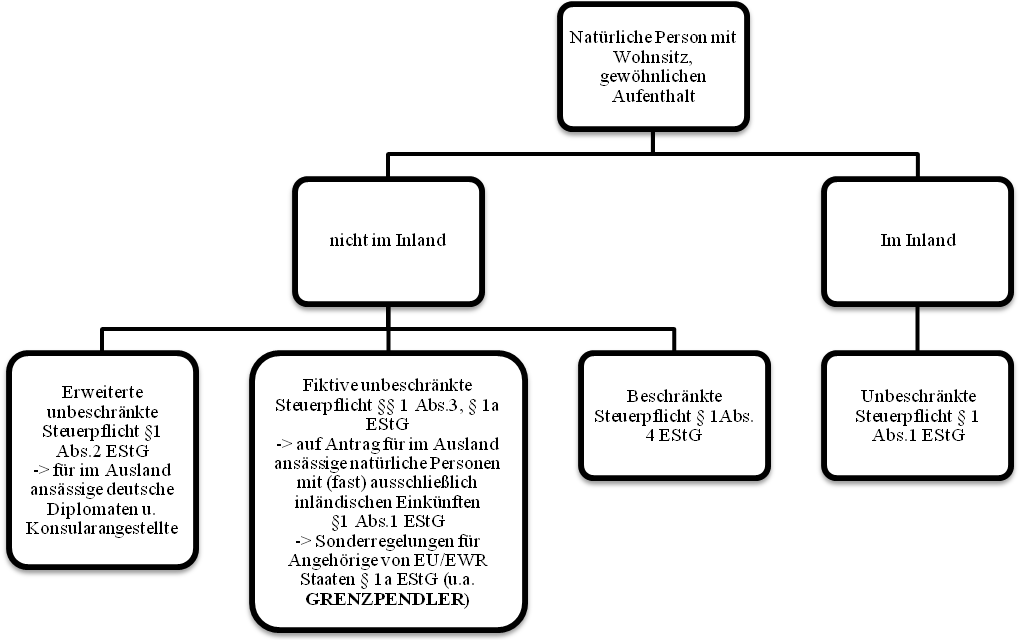 Persönliche Steuerpflicht (Quelle: Melchior,J. u.a. (2011), S.117)